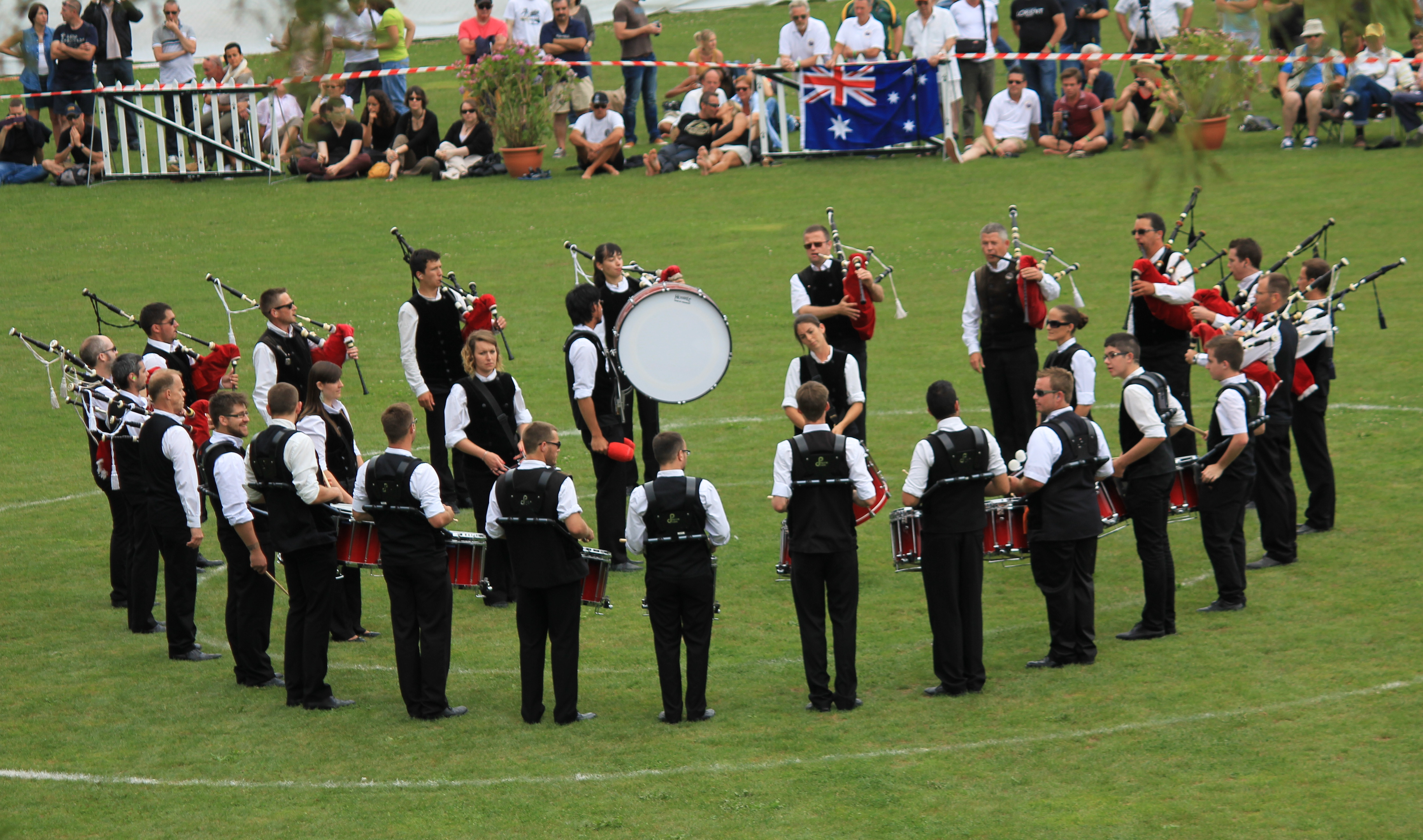 Cap Caval Pipe Band lors du championnat Guinness de Pipe bands, organisé lors du festival interceltique de Lorient 2014.